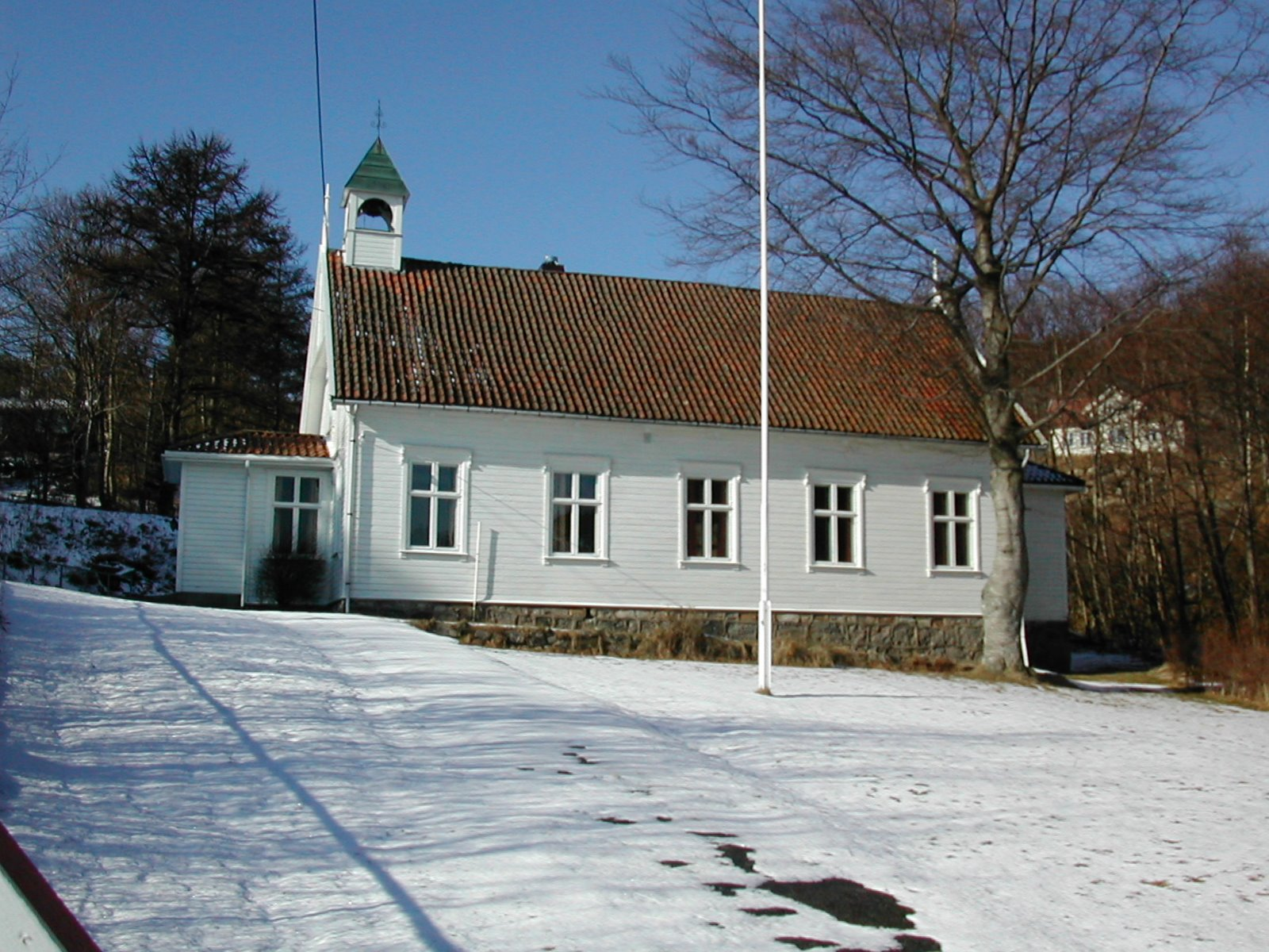 Skjernøy kapell